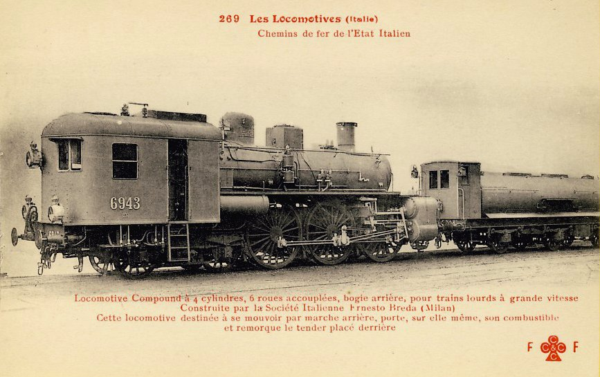 Locomotiva 6943 delle Ferrovie dello Stato, appartenente al primo gruppo 690, rinumerato nel 1907 gruppo 670.